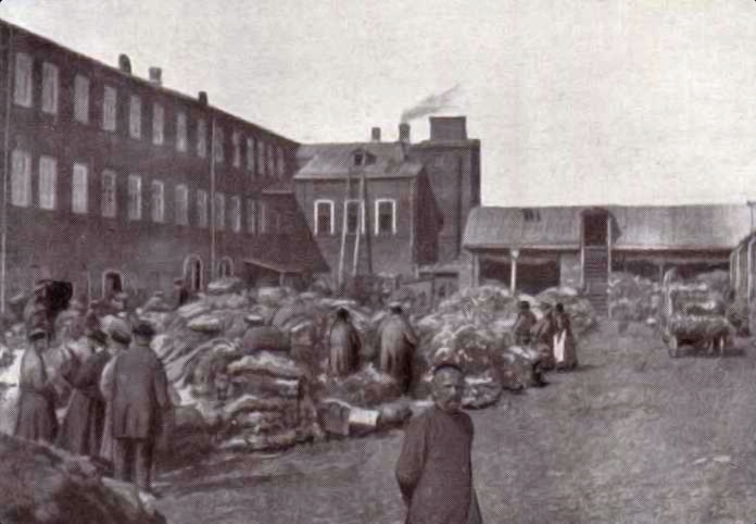 Fur skins in Nizhny Novgorod. Stapelplatz von Fellen in Nischny Nowgorod.